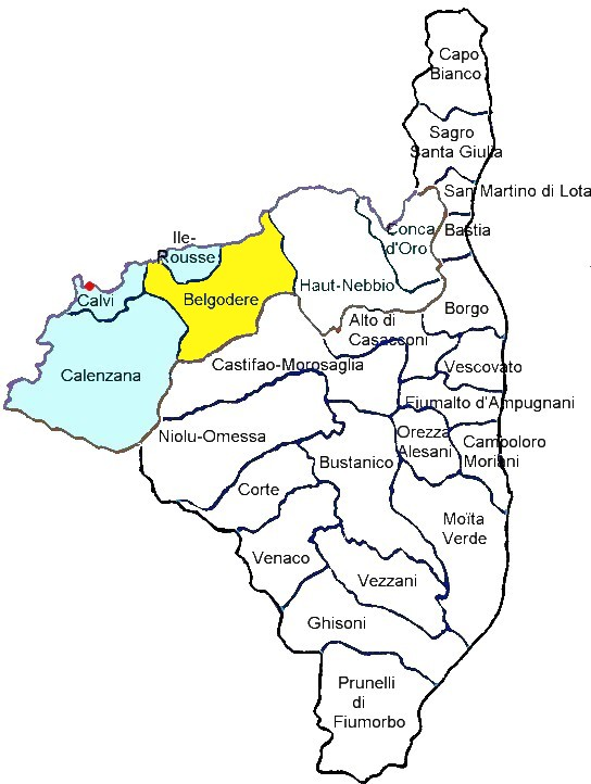 Canton de Belgodere, Haute-Corse. Canton électoral actuel en Balagna. Regroupe électoralement les anciens cantons de Belgodere, Muro et Olmi-Capella. Corsu: Ghjura eletturale balanina cu i vecchji cantoni di Belgudè, Muru è Olmi Capella